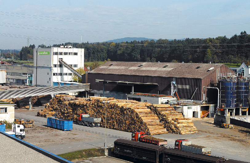 Pavatex Werk in Cham, Schweiz